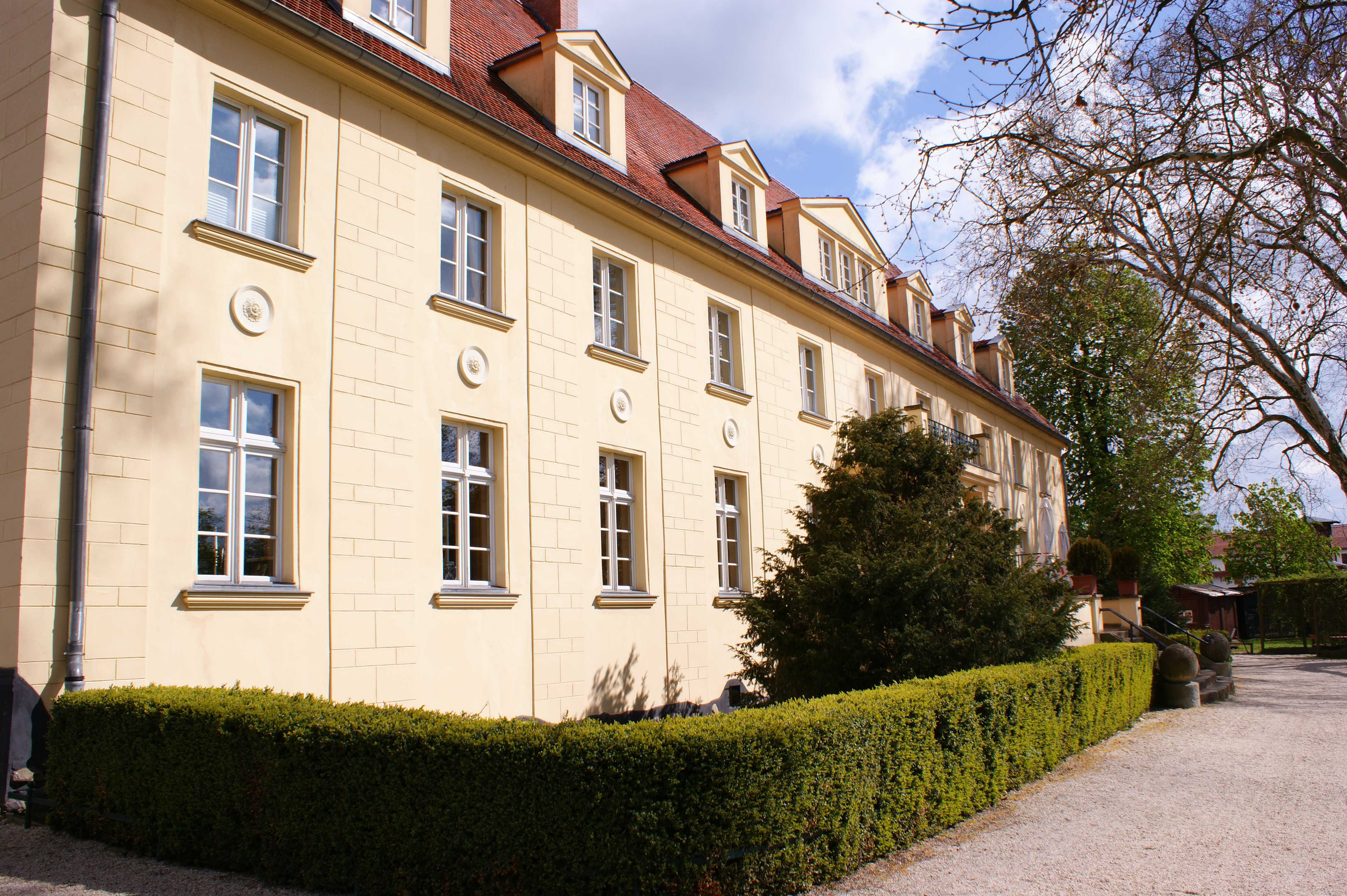 Schloss Diedersdorf (Rückseite)